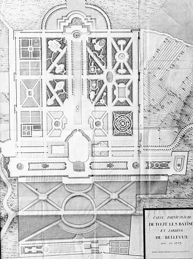 Plan du domaine de Bellevue à Meudon